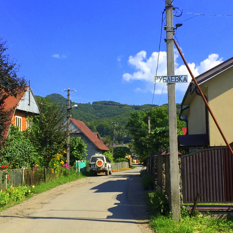 Так називають цей район через те, що тут живуть люди, які їздять на заробітки в Росію і привозять рублі